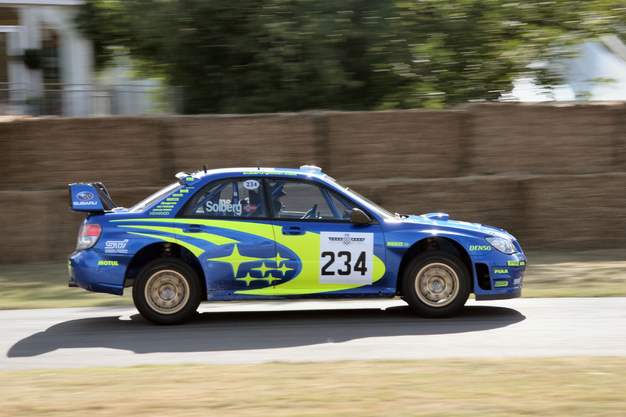 Peter Solberg's Subaru Impreza WRC2006 at 2006 GFoS.